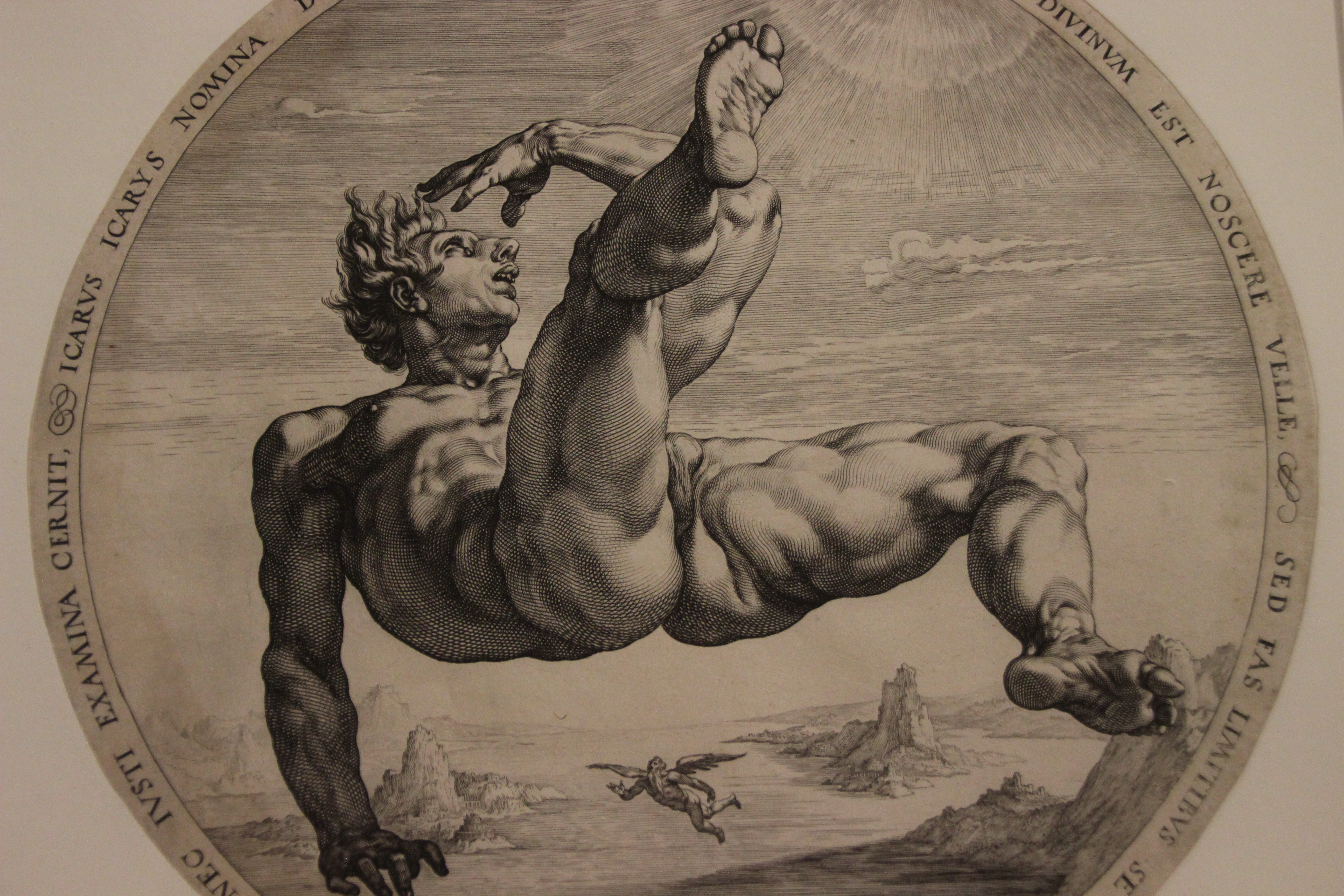 Icare, gravure d'Hendrick Goltzius, au MBA de Caen septembre 2017(#100wikicommonsdays session 2 jour 35)